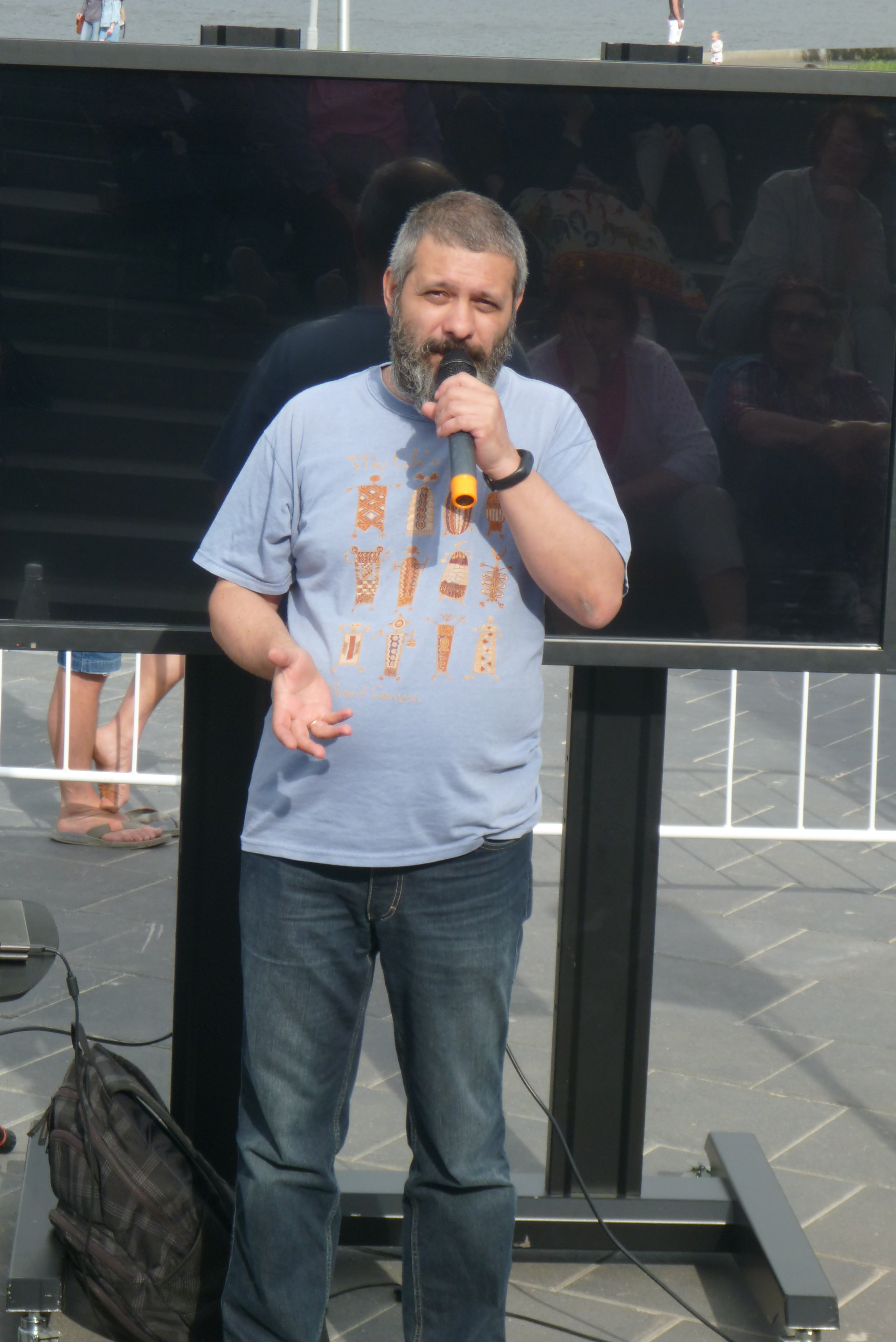 Владимир Харитонов один из основателей издательства Кабинетный ученый в Ельцин-центре 12 июня 2019 года